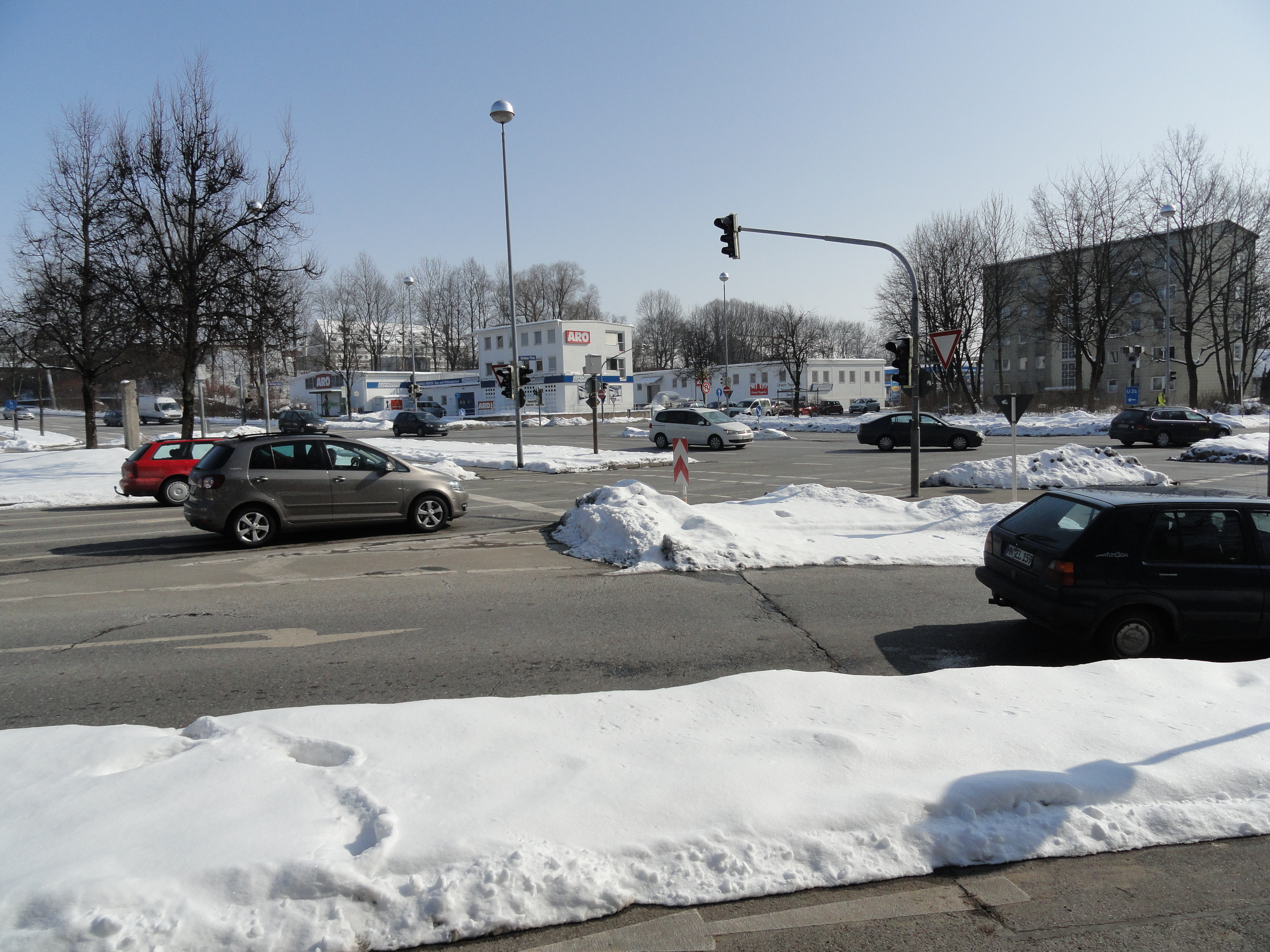 Berliner Platz / Mittlerer Ring (Kempten)